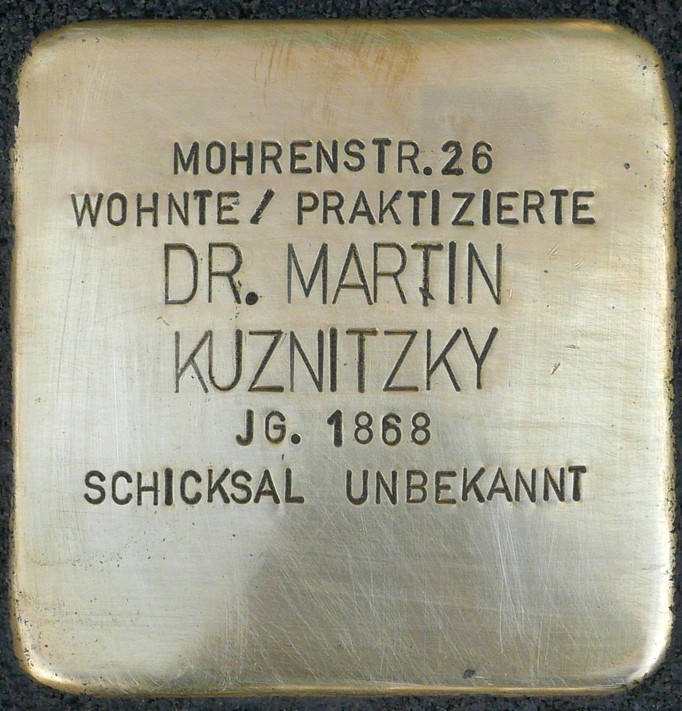 Stolpersteine Köln: Verlegung der Stolpersteine für Martin Kuznitzky, Mohrenstrasse 20 (ehemals Hausnummer 26) am 10. September 2018